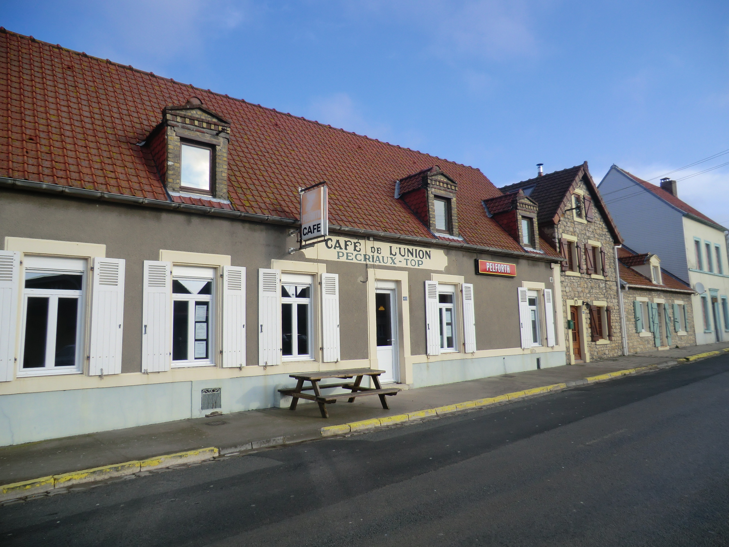 Architecture allongée et tuiles rouges - typique du Boulonnais (Pas-de-Calais, France).